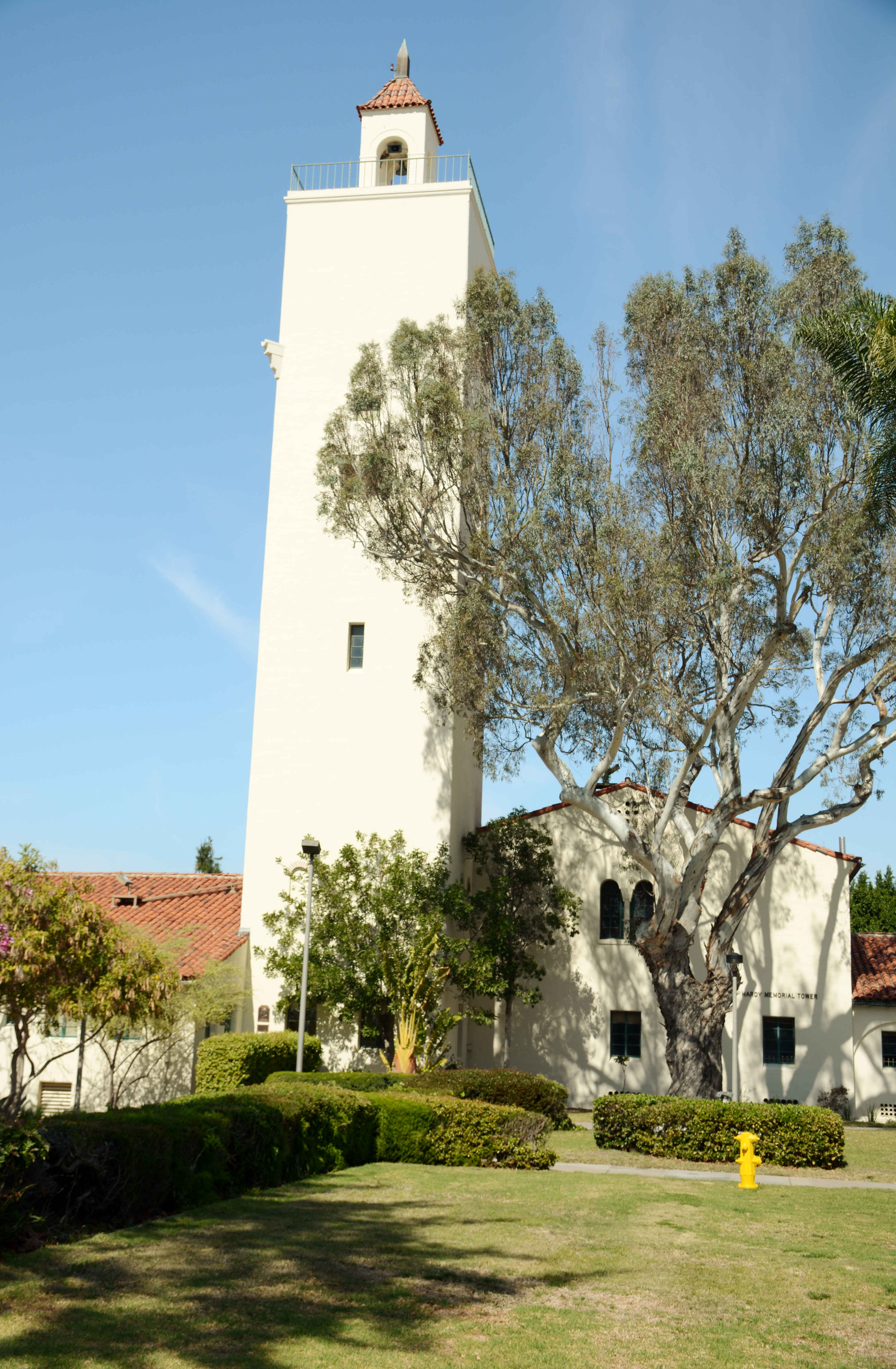 College West, San Diego, CA, USA